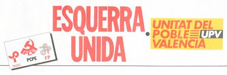 Logotipo de la coalición Esquerra Unida - Unitat del Poble Valencià. Fragmento de image:Coalició IU-UPV.jpg